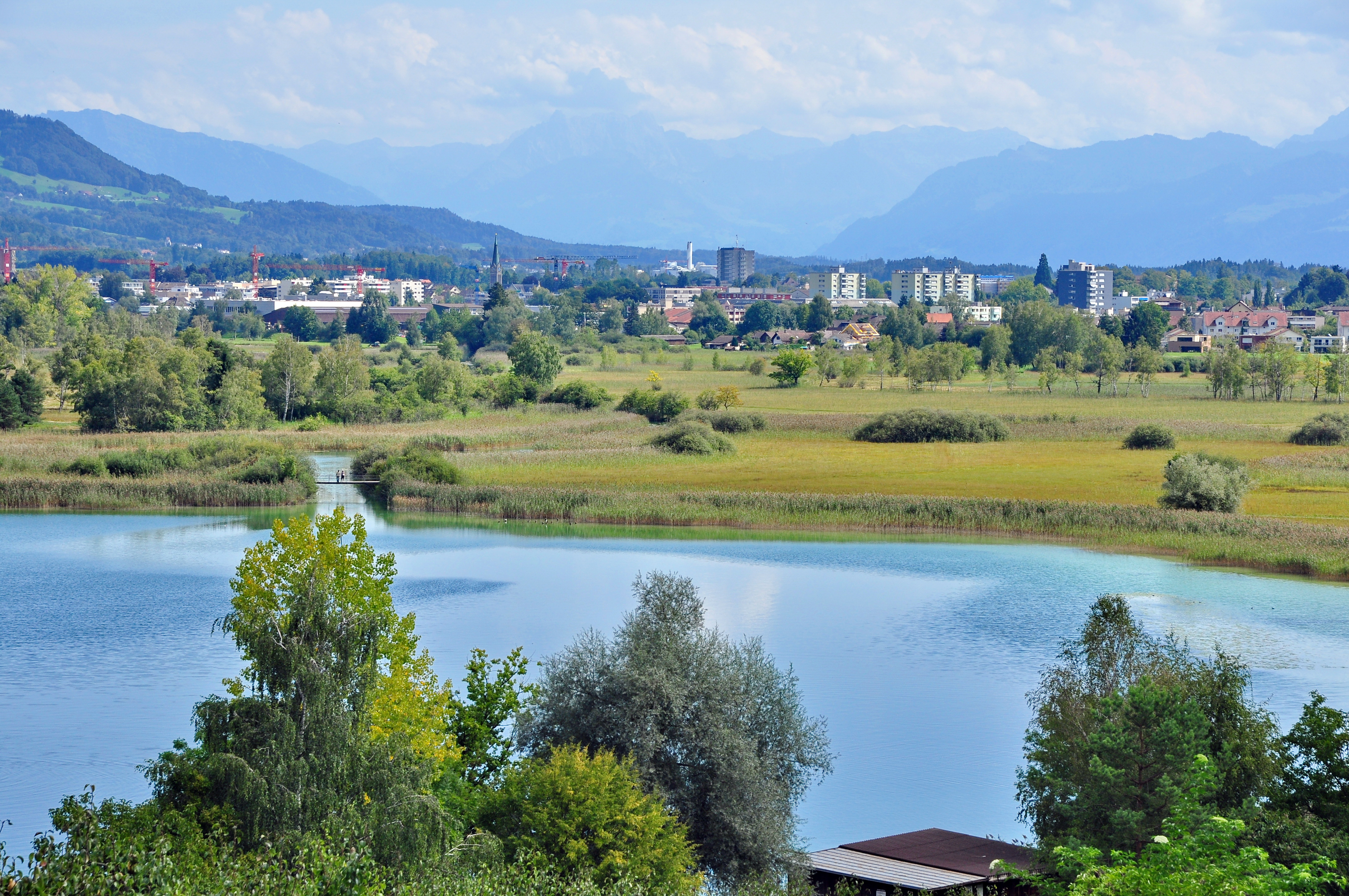 Pfäffikersee, Wetzikon, Aabach and Robenhuserriet, as seen from Seegräben in Switzerland.